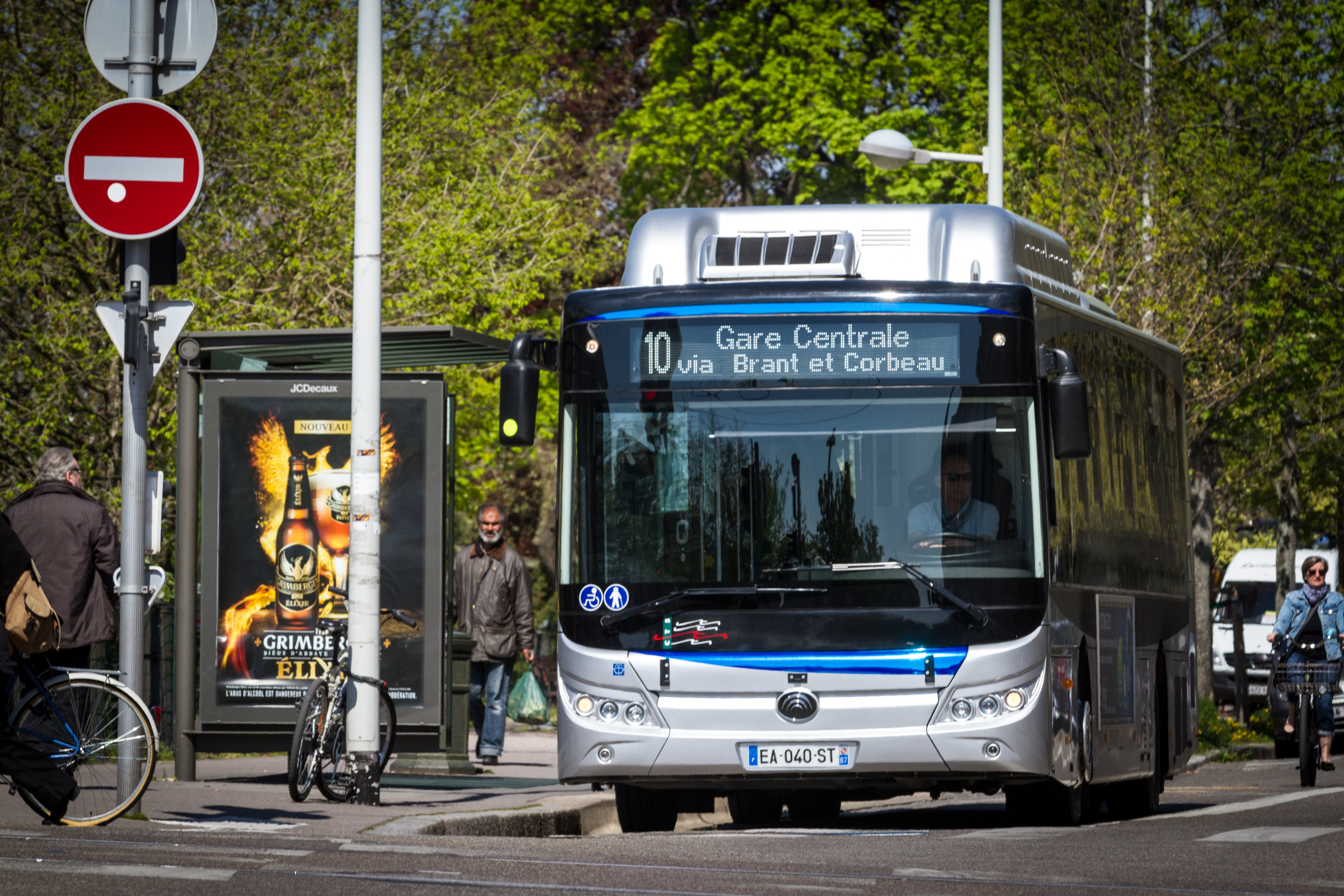 Strasbourg CTS ligne 10 essai bus électrique Yutong 20 avril 2016